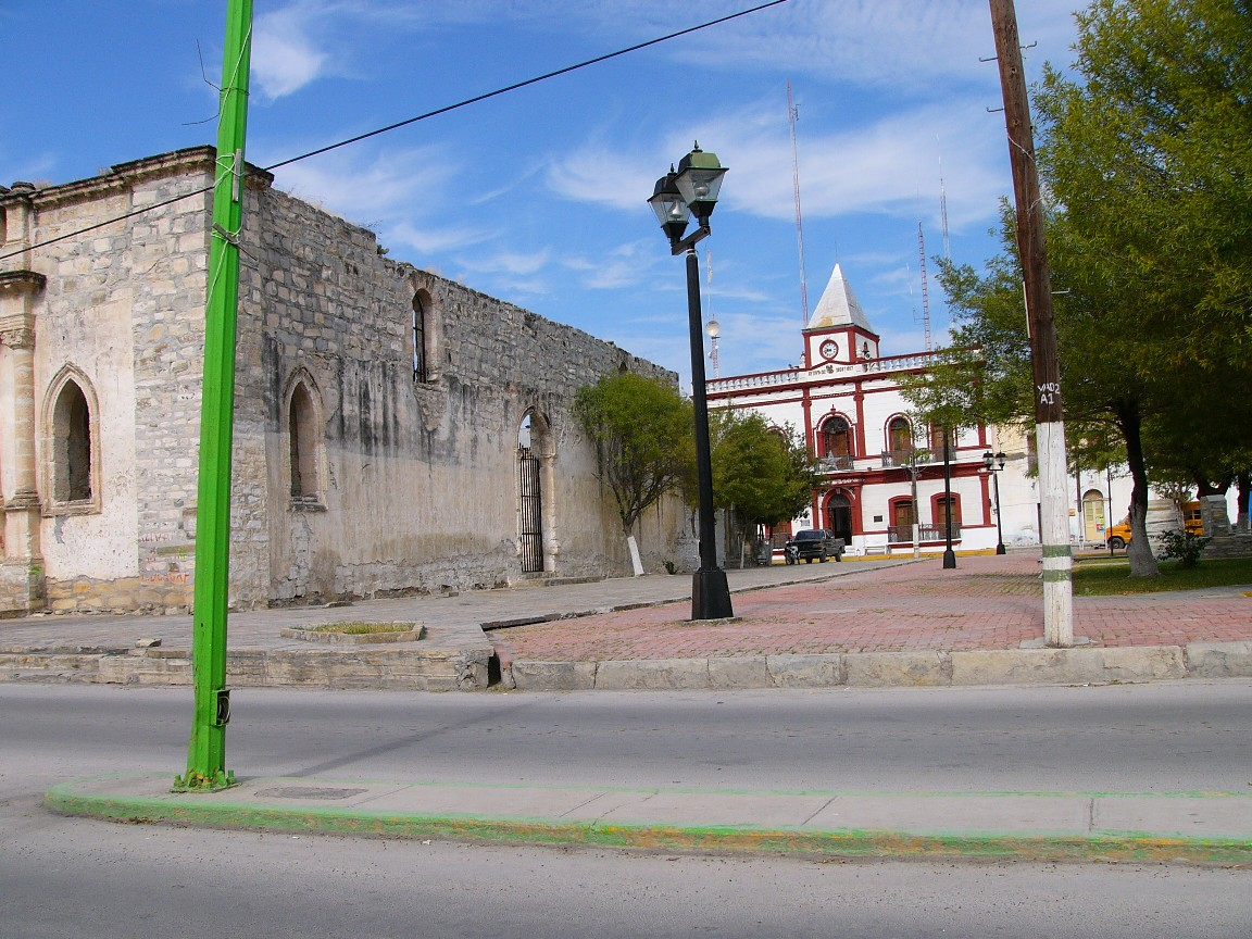 Templo de San Pedro y Palacio Municipal